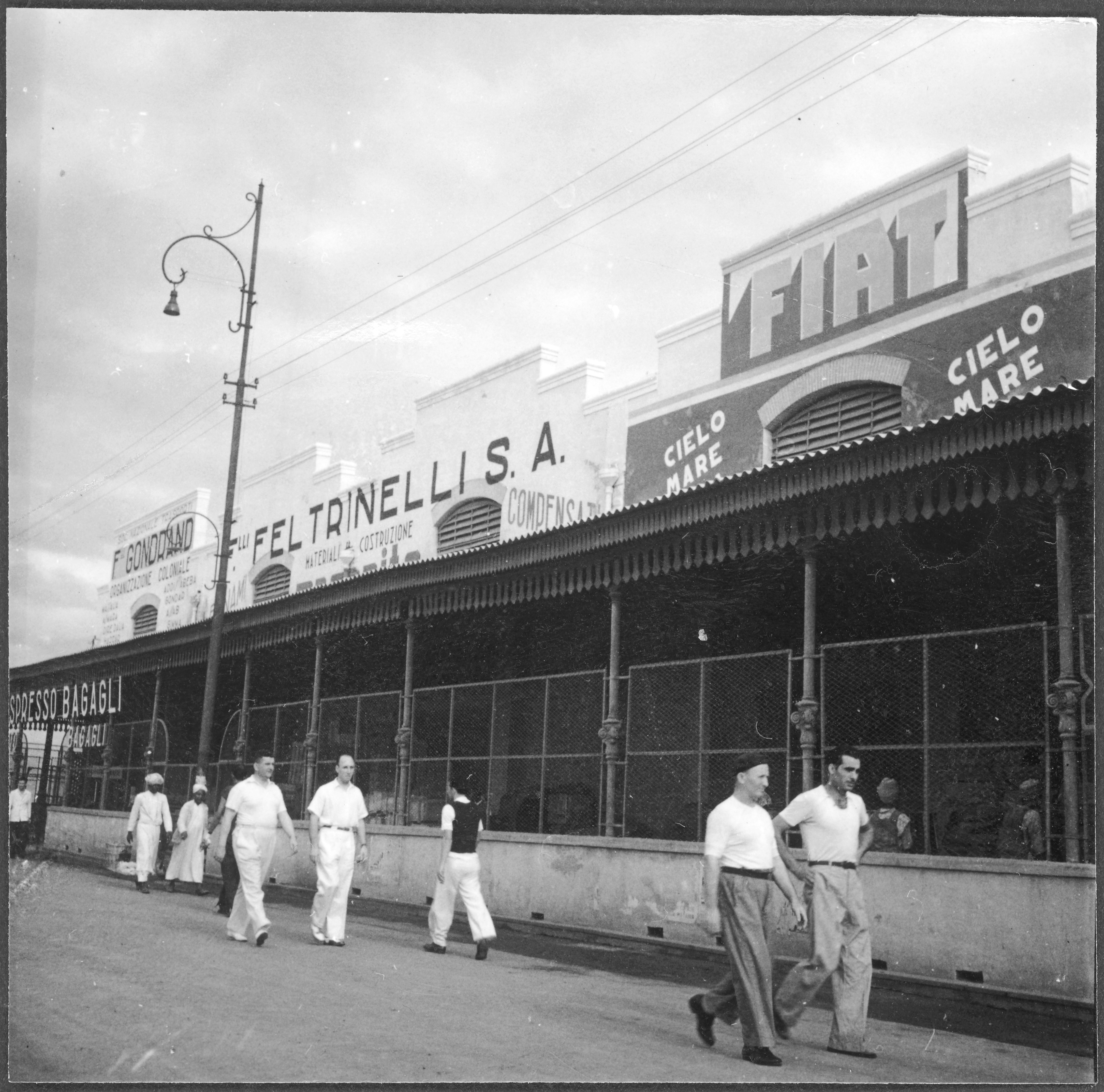 Italienisch-Ostafrika, Massana (Massawa, Massaua): Hafen; Geschäftshäuser an einer Strasse, davor Matrosen